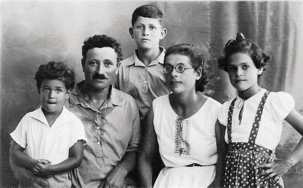 משפחת שמחוני - מימין לשמאל: רוני, יהודית, אסף, מרדכי, ומנחם (אחיק). קיבוץ תל יוסף